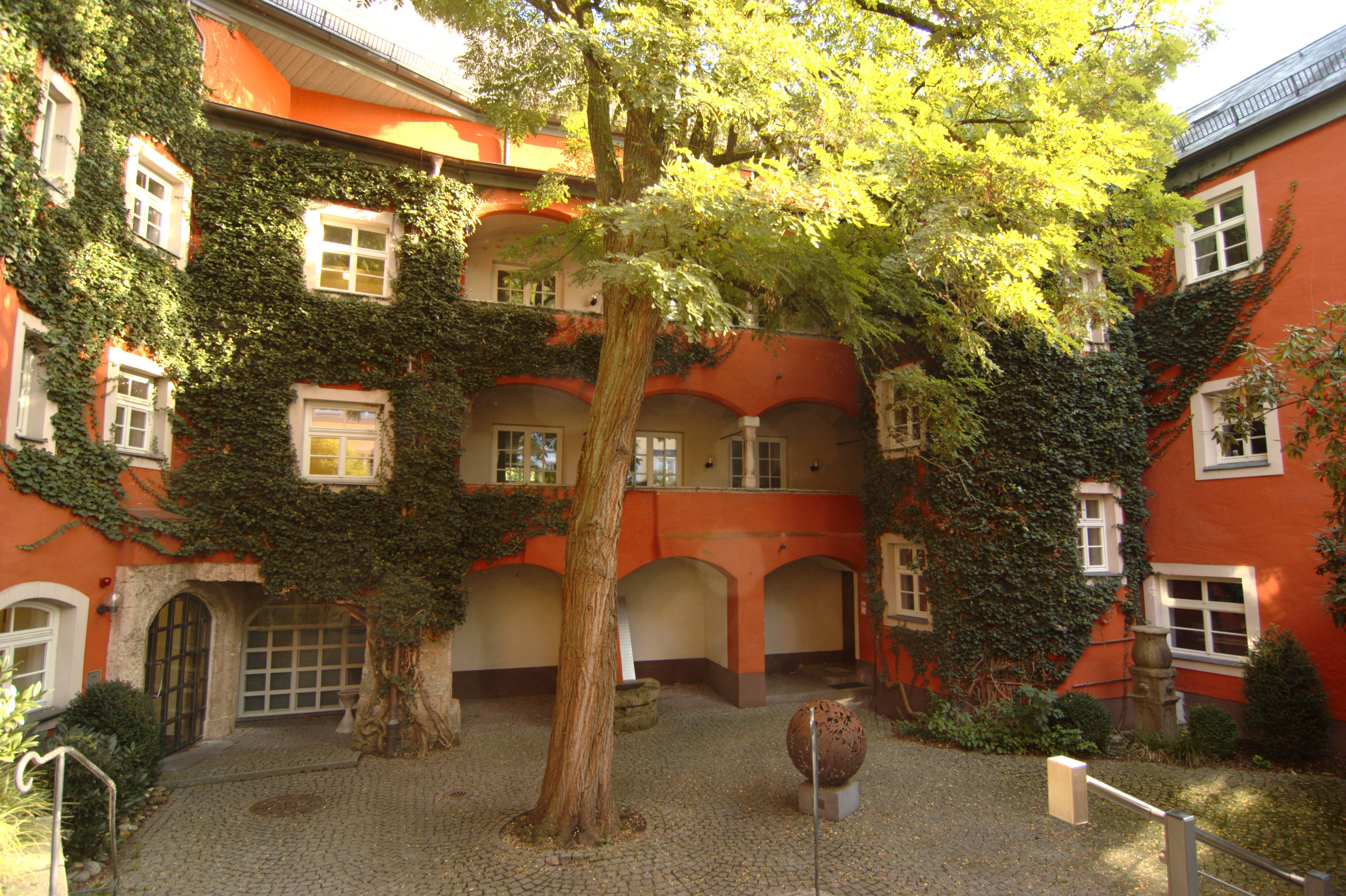 Mautnerschloß, Innenhof mit Renaissancearkaden und Turm in der SüdosteckeThis is a photograph of an architectural monument.